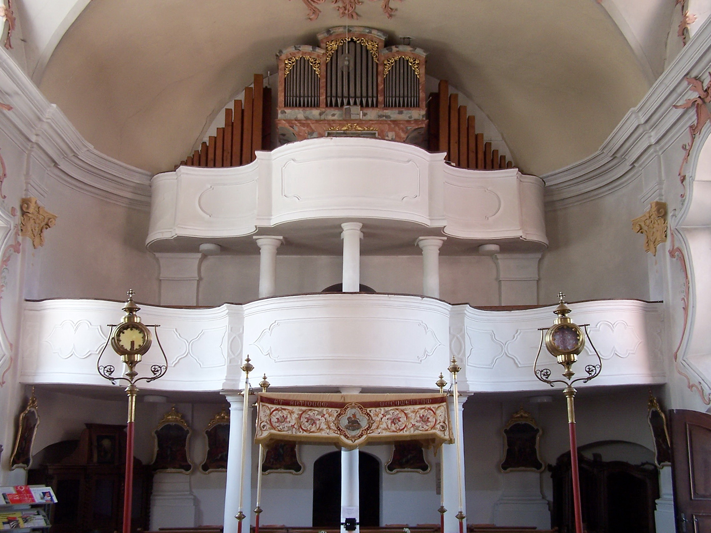 Rottenburg an der Laaber. Oberhatzkofen, Schulweg 3. Katholische Pfarrkirche Mariä Himmelfahrt. Flaches Tonnengewölbe im Langhaus. Abschluss des Langhauses mit einer Halbkuppel. Zweigeschossige Empore auf jeweils drei Säulen ruhend. Geschweifte Brüstung mit Rahmenstuck.